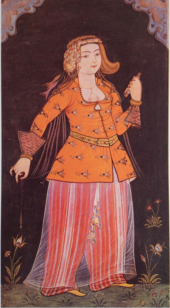 Ottoman Palace maiden (Odalık). Ottoman miniature painting, kept at the Topkapı Sarayı Müzesi, Istanbul (Inv. 2164/15b)